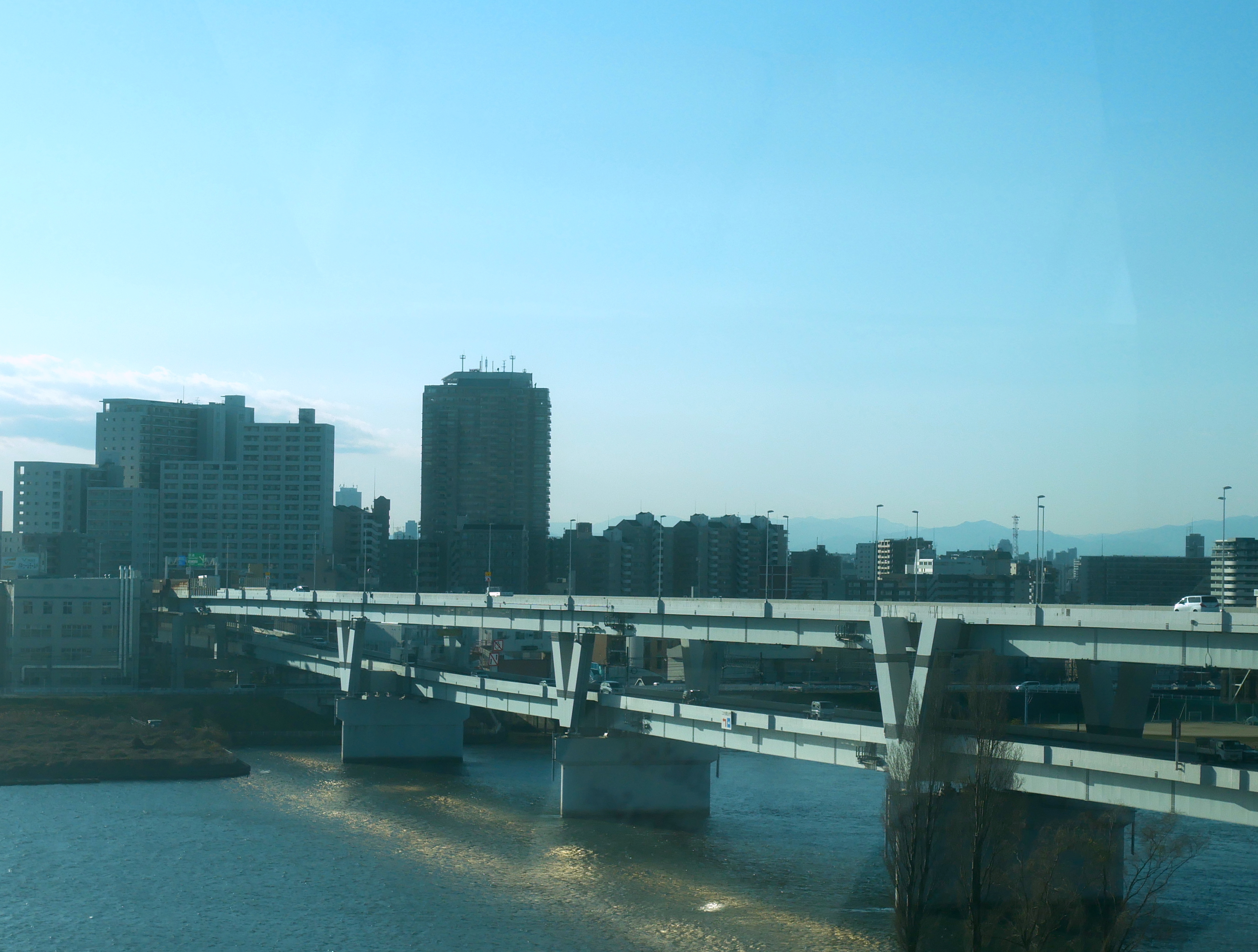 新荒川橋 (Shinarakawa Bridge) Panasonic Lumix DMC-GX7 Mark II